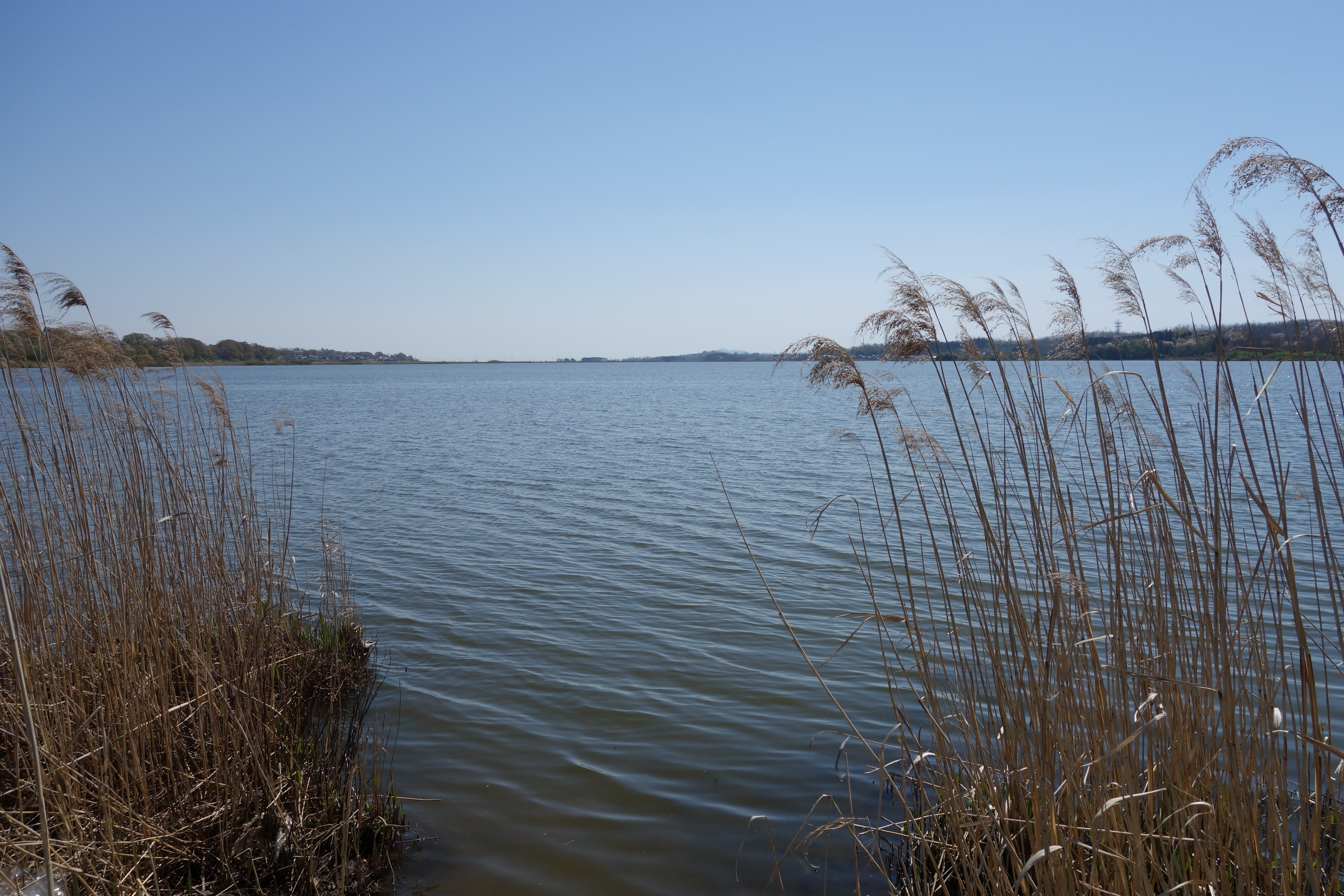 秋田県能代市浅内にある浅内沼